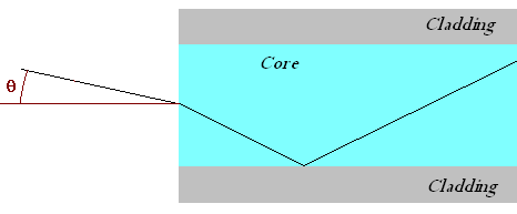 Numerical Aperture